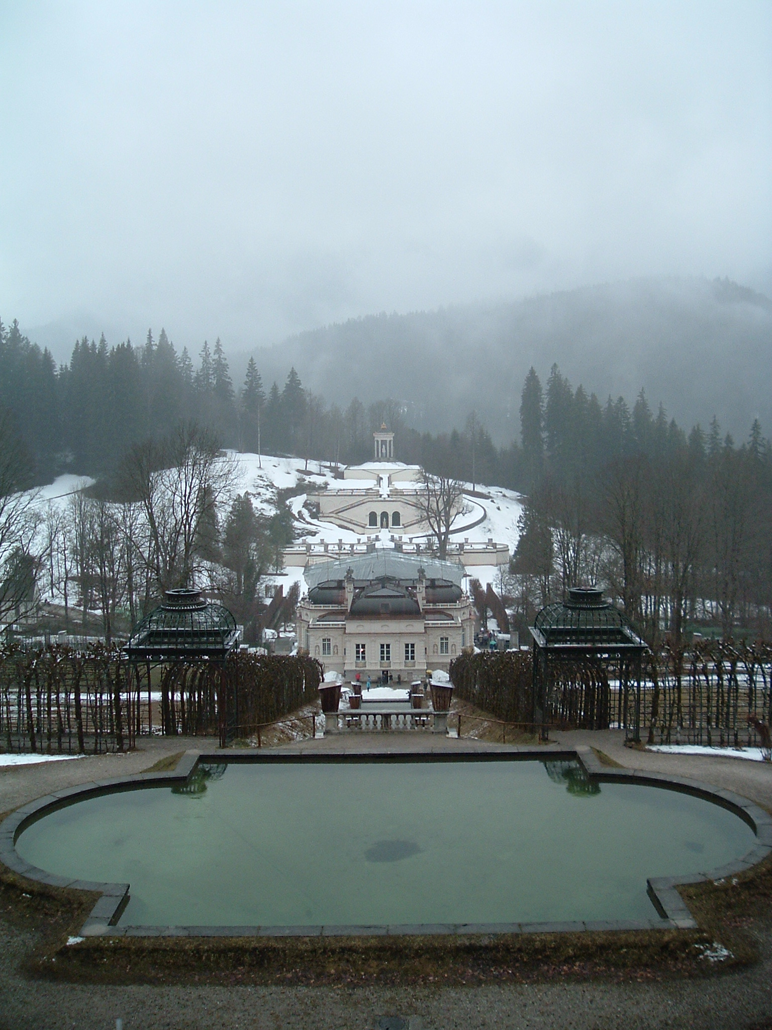 Photo personnelle (avril 2004)